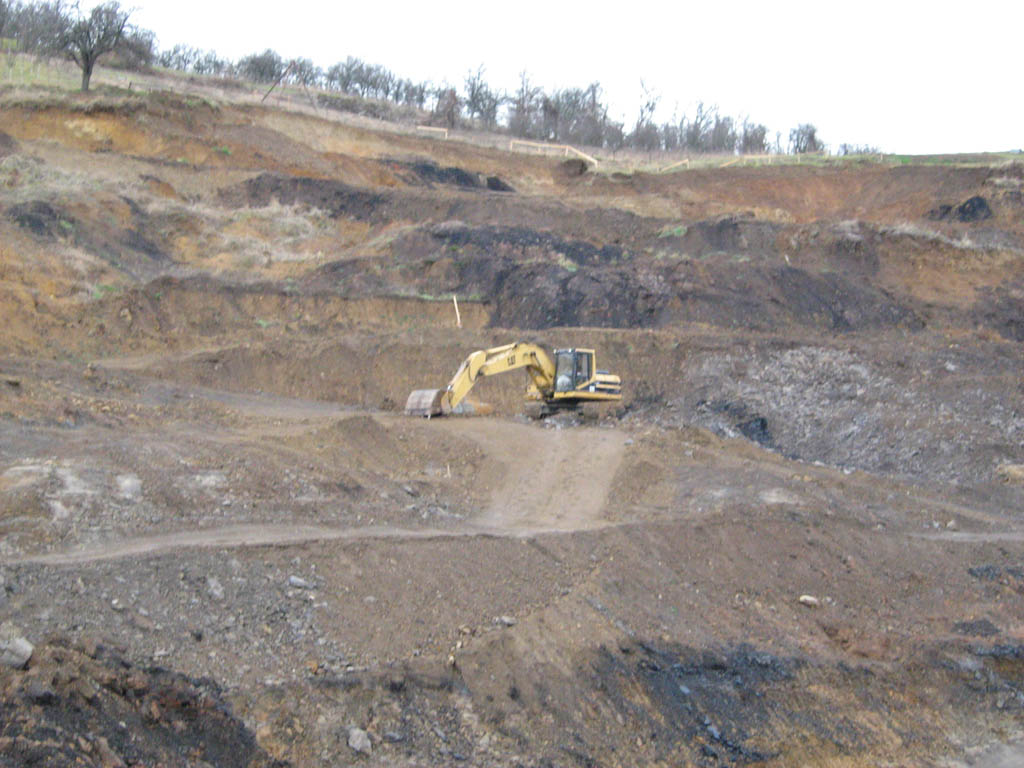 Површински коп рудника Ушће. Камени угаљ се ископава у три површинске хоризонтале.